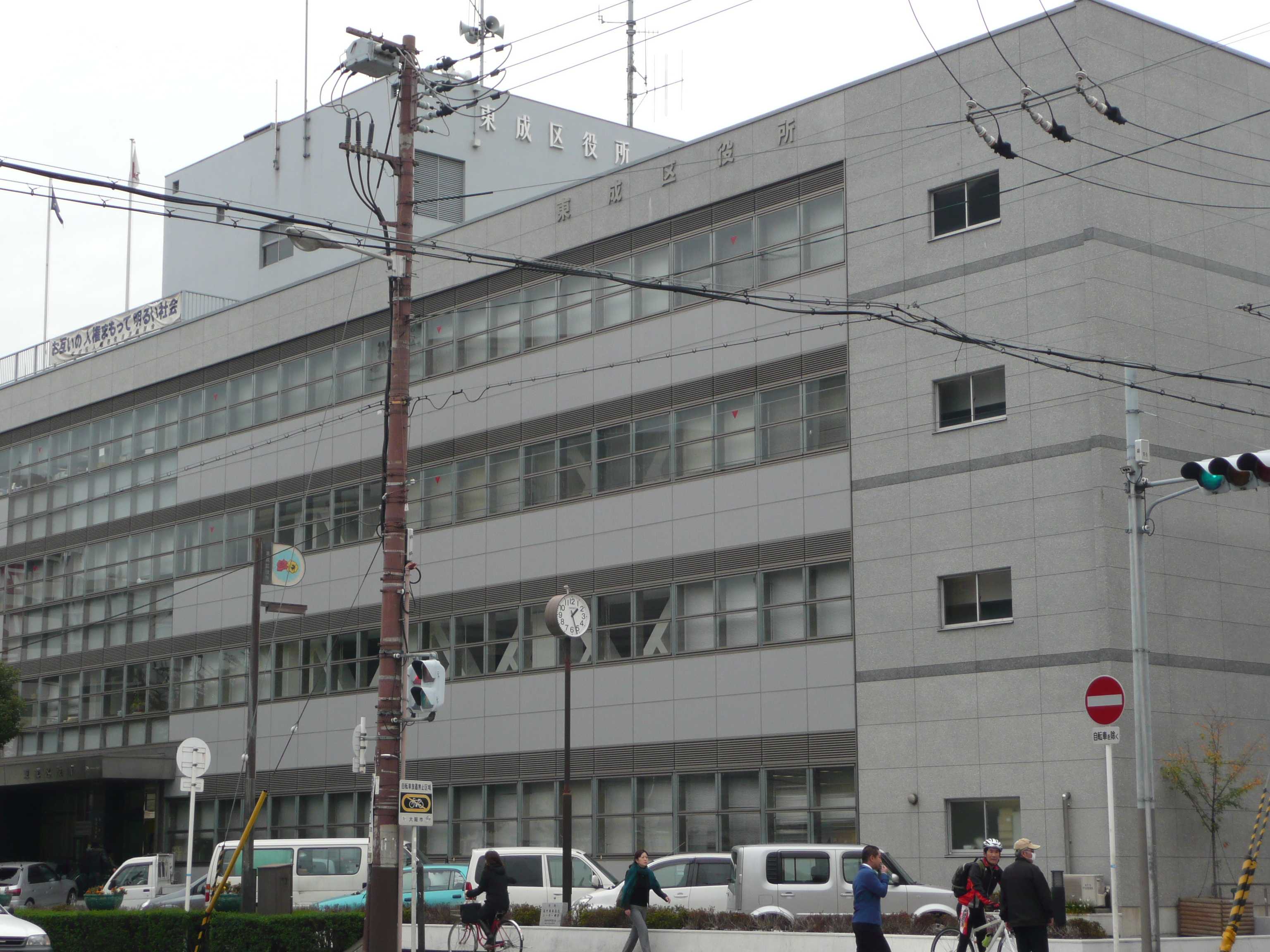 東成区役所